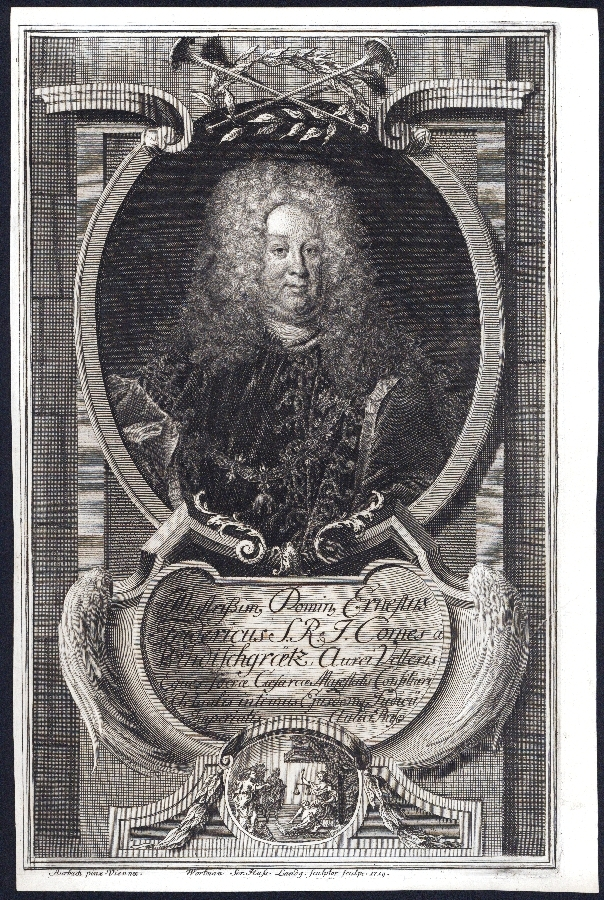 Graf Ernst Friedrich Windisch-Graetz (1670-1727)